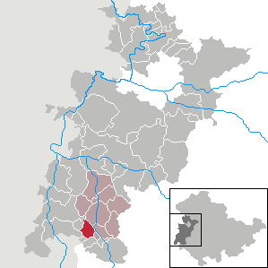 Brunnhartshausen in Thuringia - Wartburgkreis